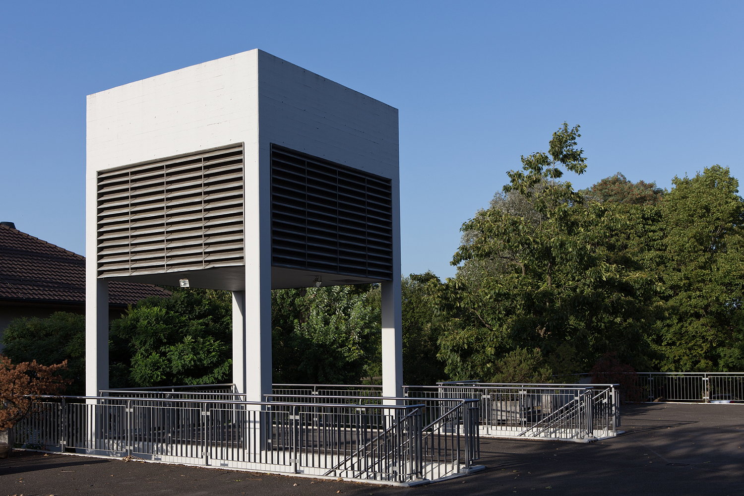 Katholische Kirche in Rothrist (AG)